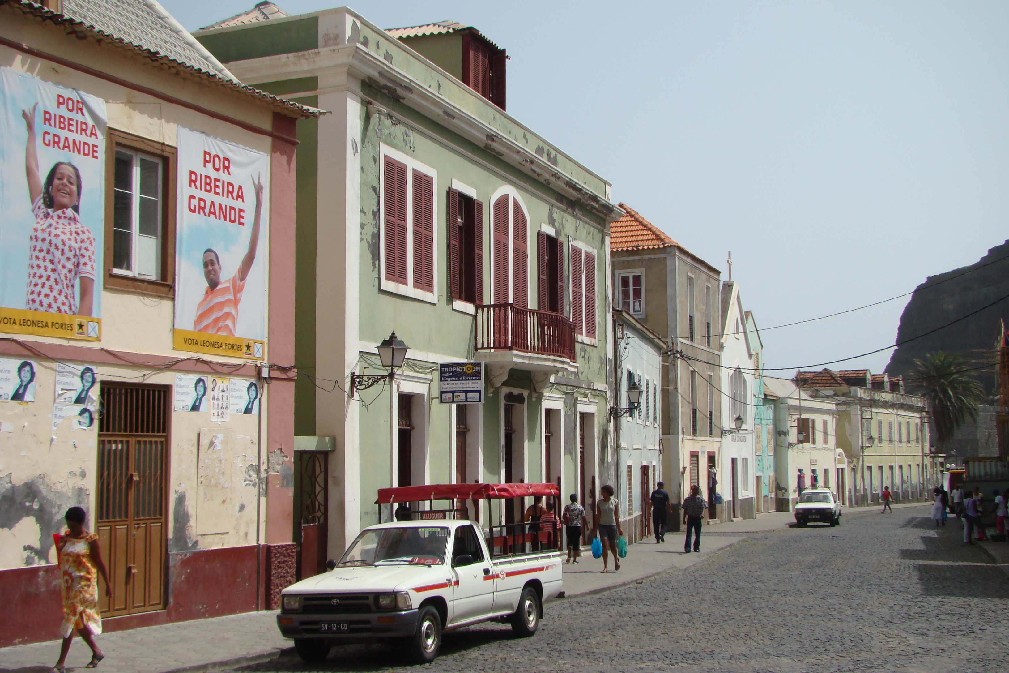 Arquitectura colonial portuguesa en una calle de Ribeira Grande (Santo Antao - Cabo Verde)